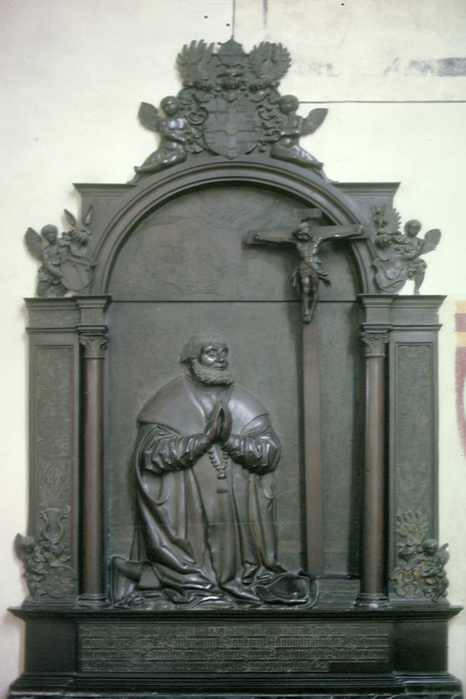 Marienkirche Bad MergentheimEpitaph des Hoch- und Deutschmeisters Walther von Cronberg